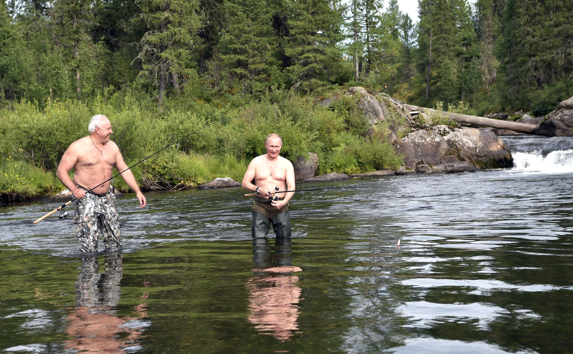 Президент России Владимир Путин с Главой Хакасии Виктором Зиминым на отдыхе в Республике Тыва. 1-3 августа 2017 года.